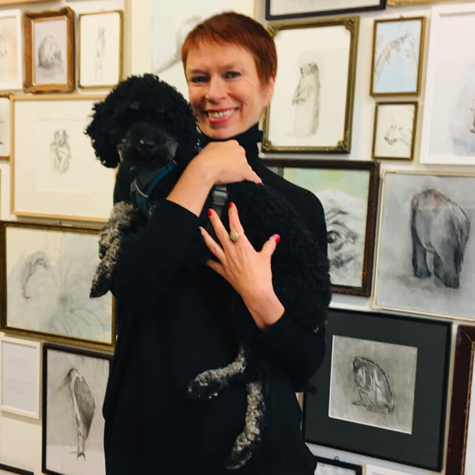 Foto: Jorunn G. Solli Bildet er tatt 28. april